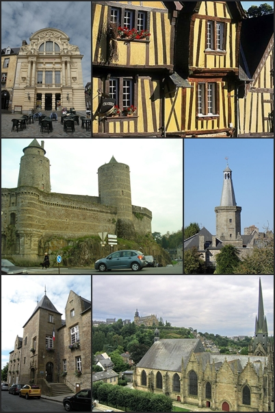 Fougères